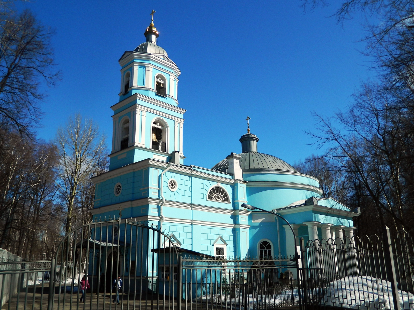 Храм Всех Святых (Пермь)